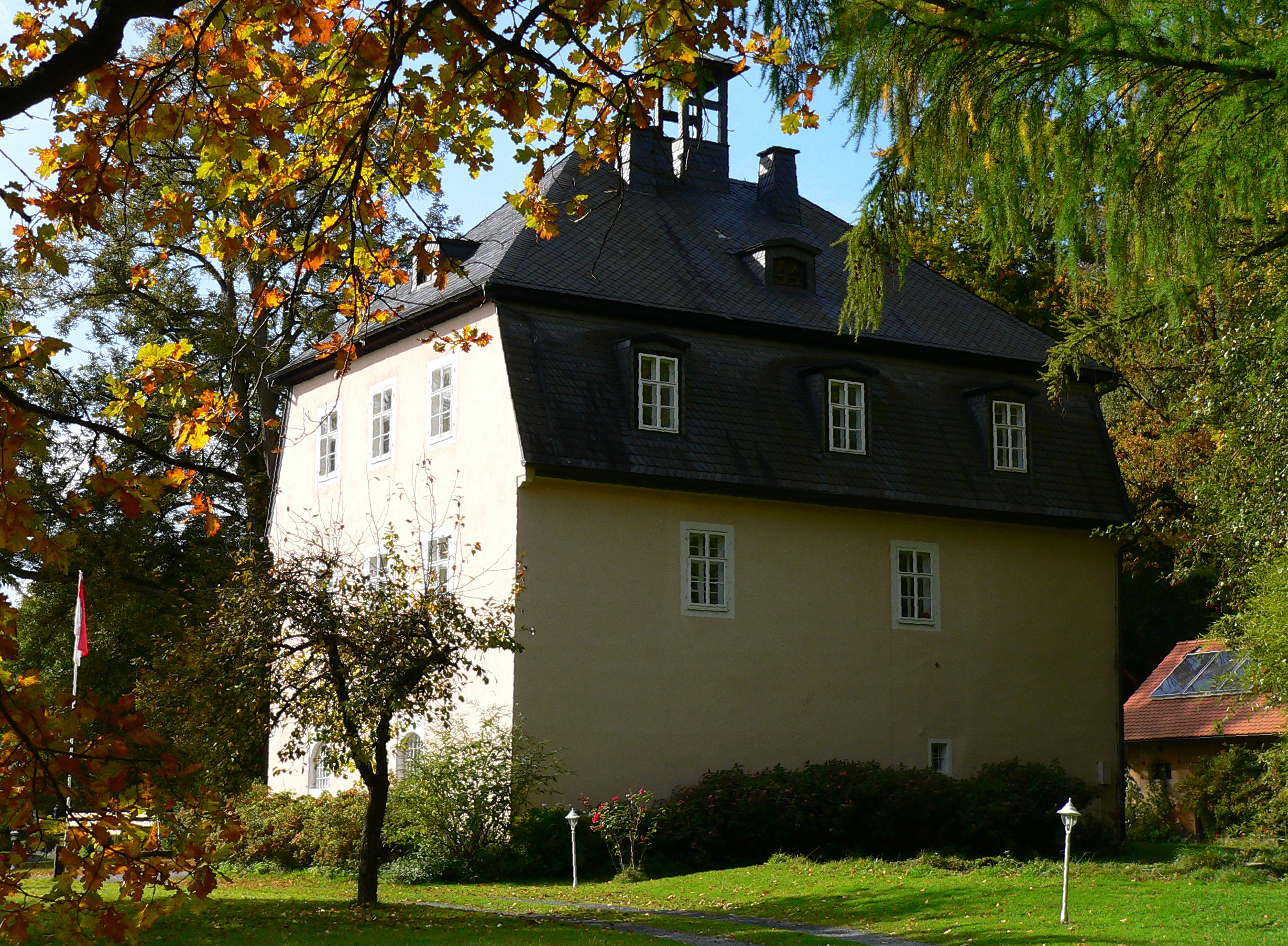 Untere Kemenate in Küps-Nagel, Bayern, Regierungsbezirk Oberfranken, Landkreis Kronach